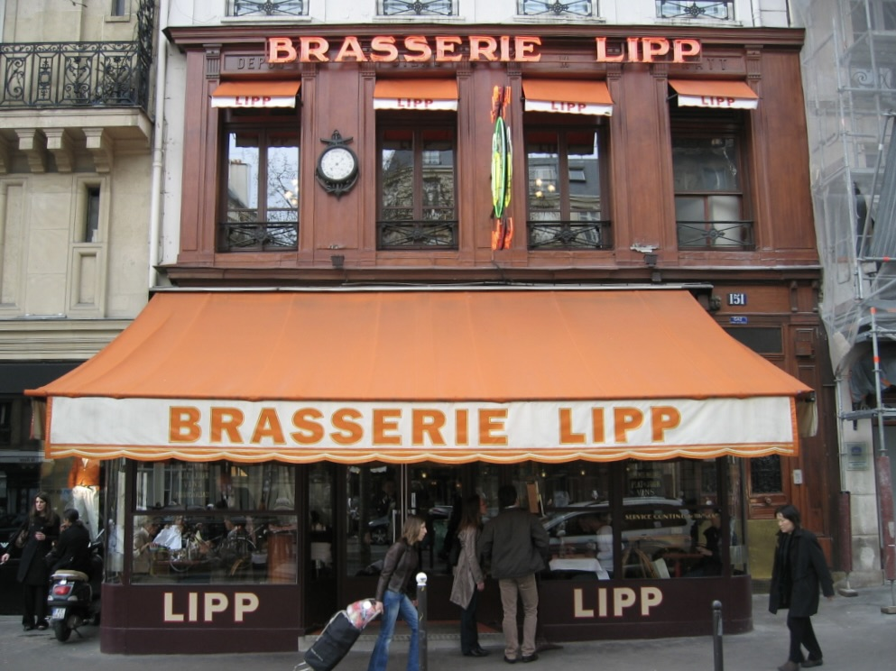 La brasserie Lipp à Paris, France.